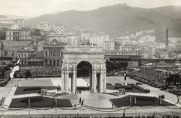 Genova, piazza della Vittoria, anni trenta